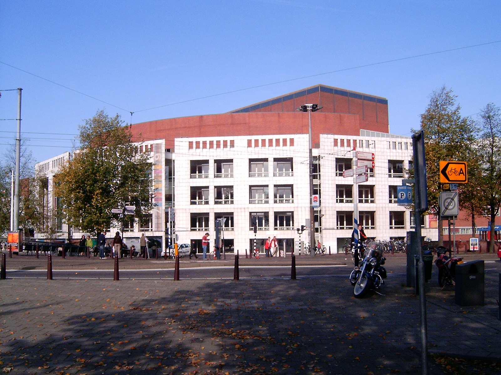 Stopera. Eigen werk.